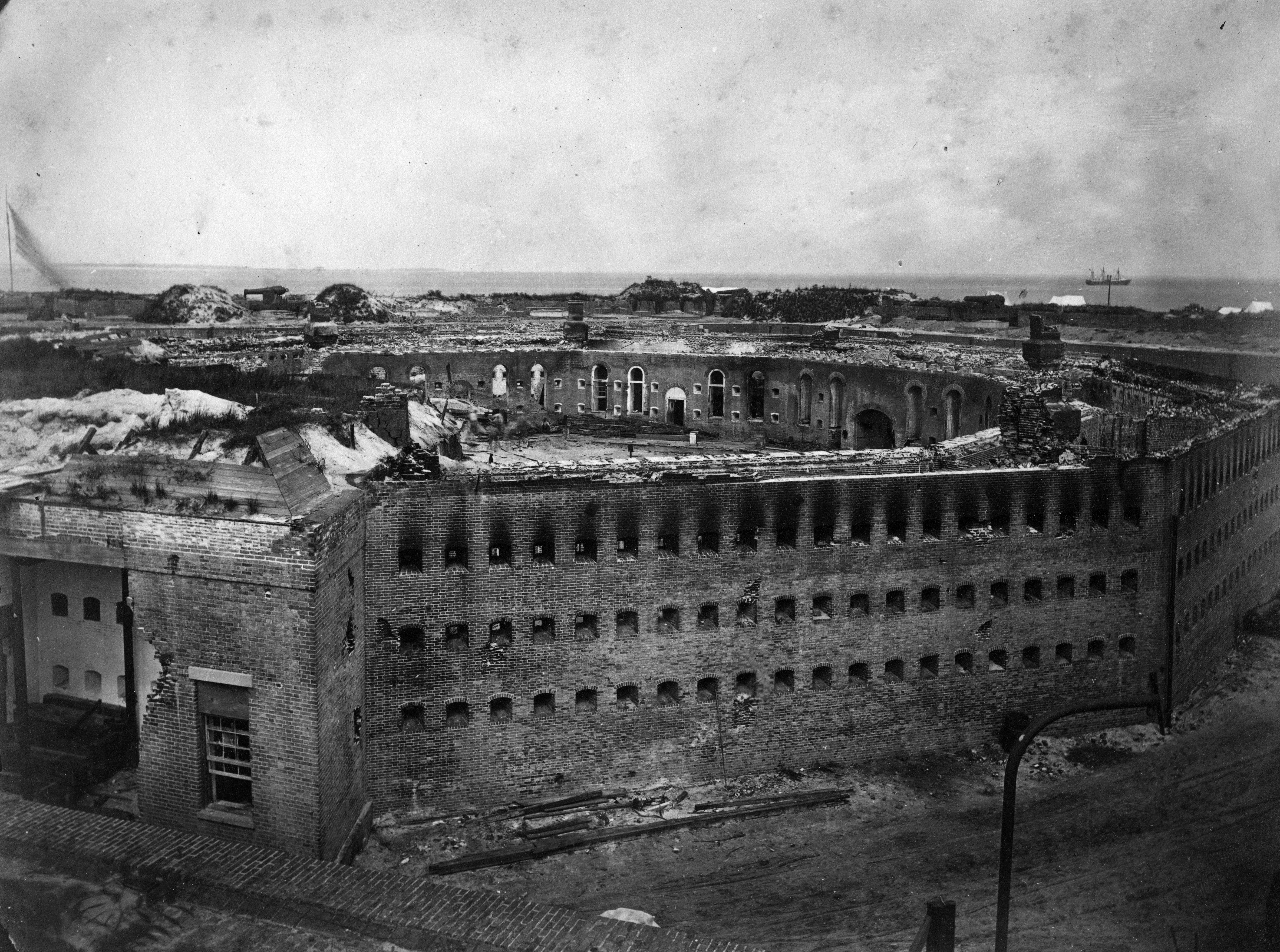 Fort Morgan in Alabama nach der Schlacht von Mobile Bay